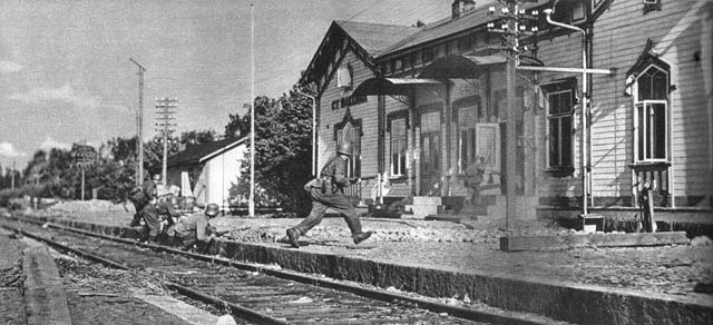 Финские солдаты входят в вокзал станции Яккима.